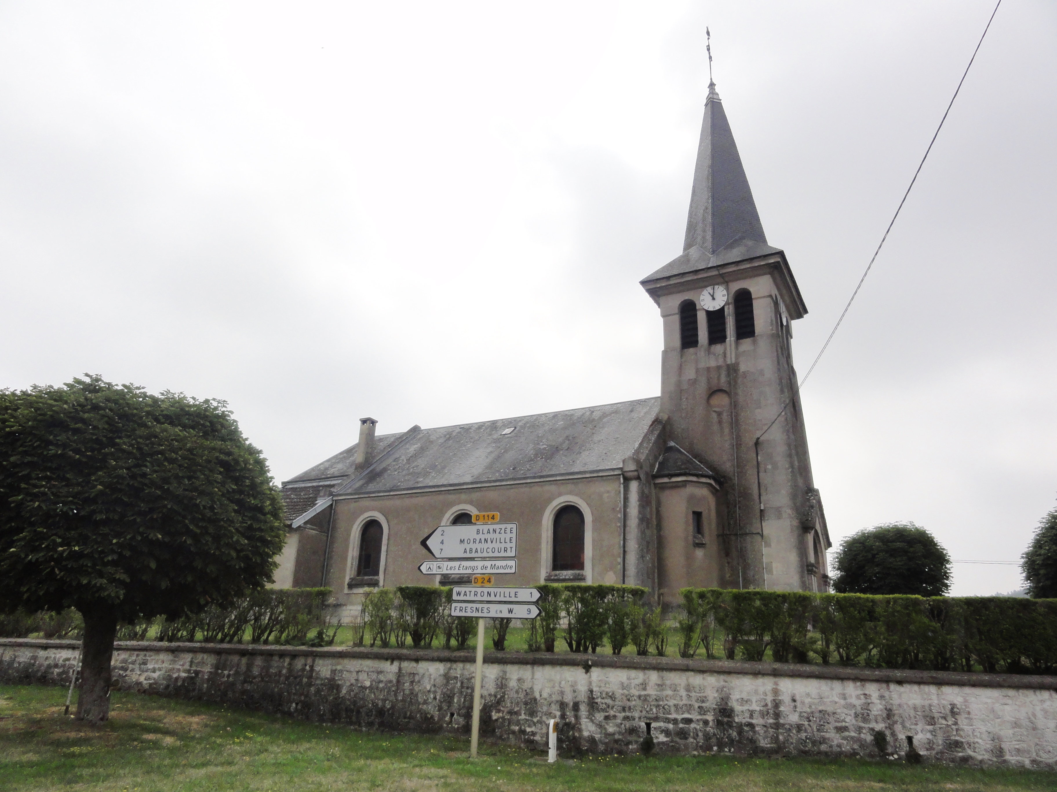 Châtillon-sous-les-Côtes (Meuse) église (01)